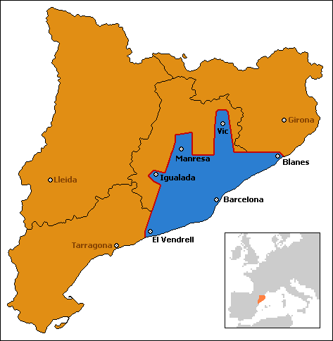 Urban Region situation in Catalonia